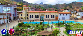 Chilia es uno de los trece distritos que pertenecen a la provincia de Pataz, en el departamento de La Libertad, de mayor población y extensión territorial.